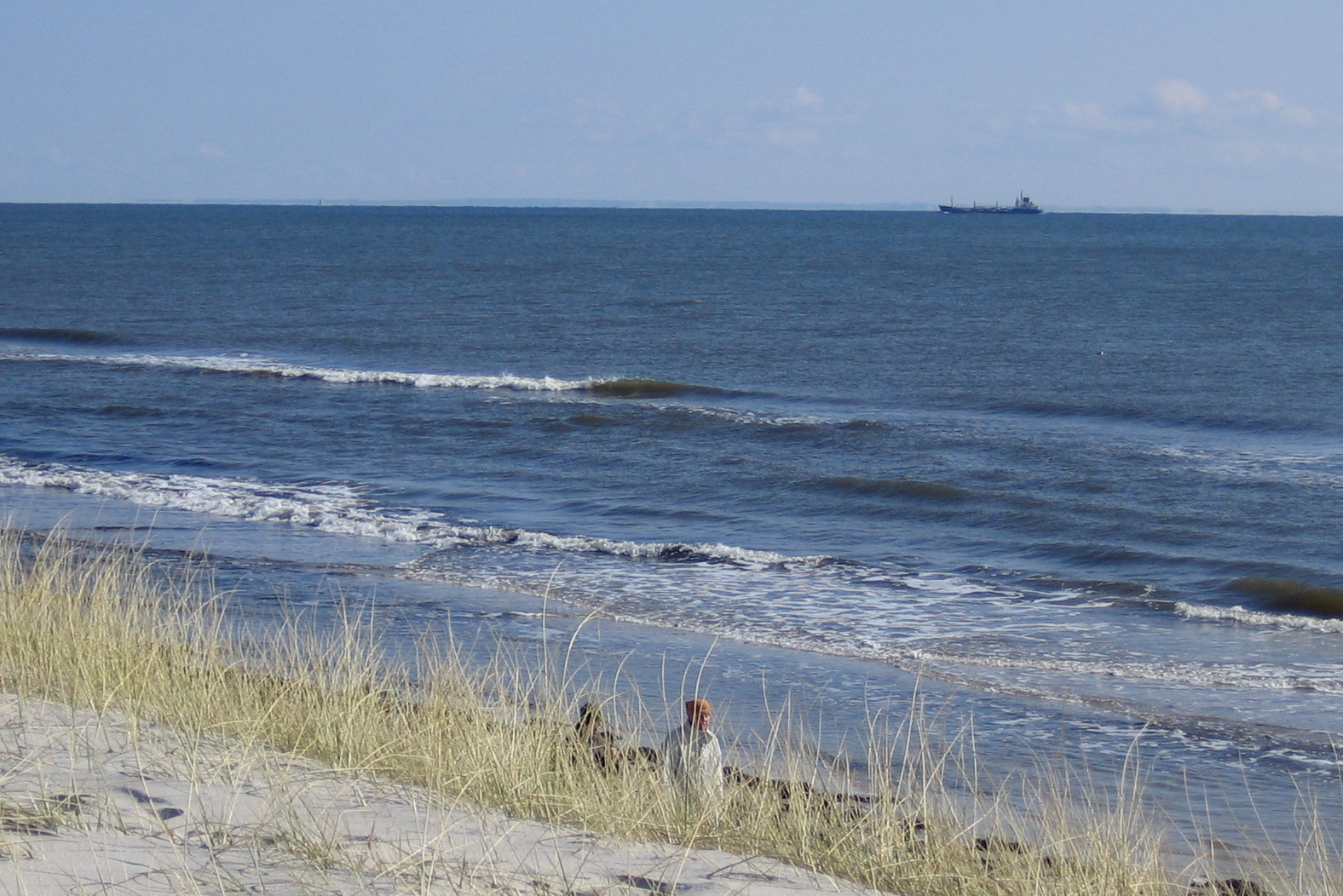 Bornholmsgattet from Sandhammaren